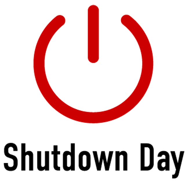 Logo des Shutdown Days